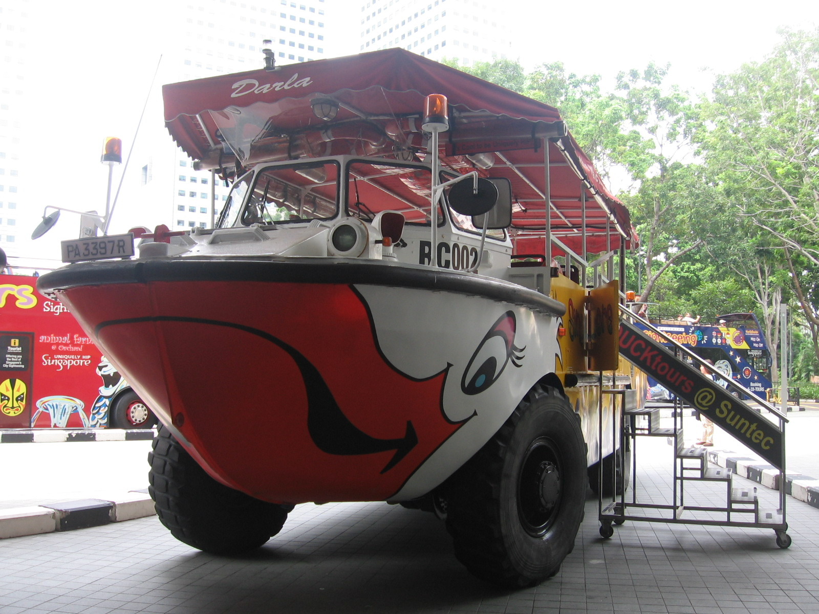 Singapore Ducktours